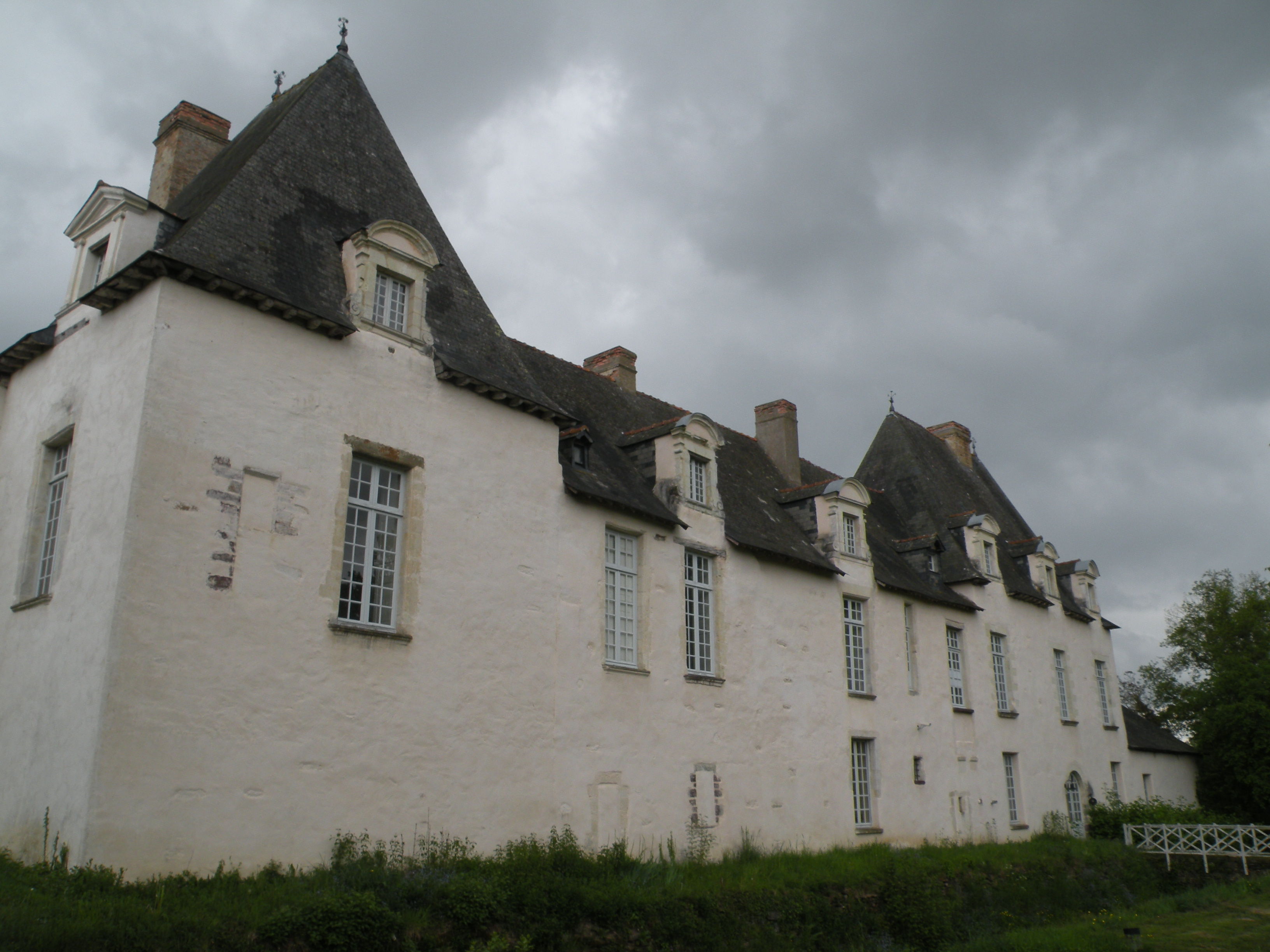 Manoir Saint-Armel à Bruz ; façade est.